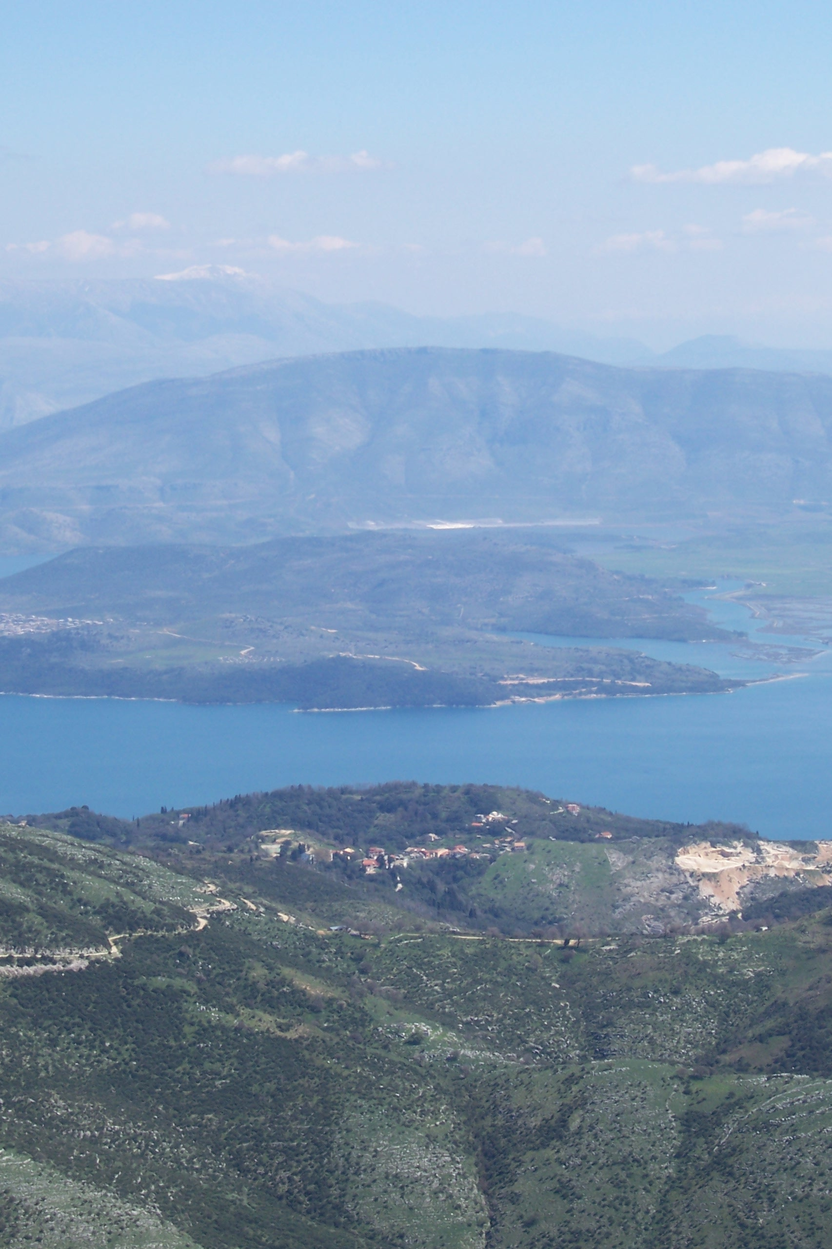 Βόριο Στενό Κέρκυρας από τον Παντοκράτωρα.